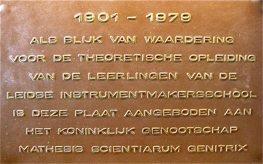 Dankbetuiging van de Leidse Instrumentmakerschool aan Mathesis Scientiarum Genitrix in 1979